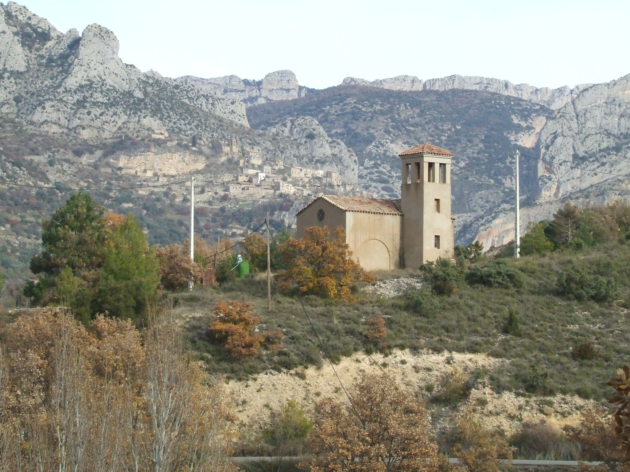 Santa Àgueda (Abella de la Conca, Pallars Jussà)